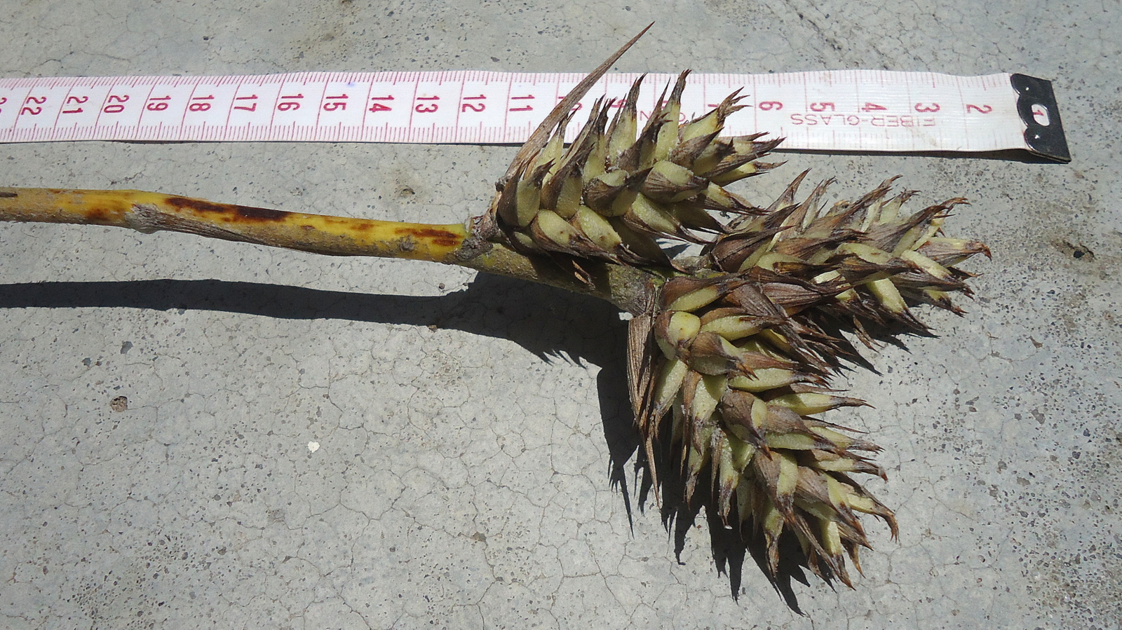 Hohenbergia littoralis L.B.Sm.